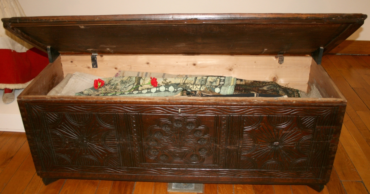 snimljeno tijekom Noći muzeja u Etnografskom muzeju u Zagrebu